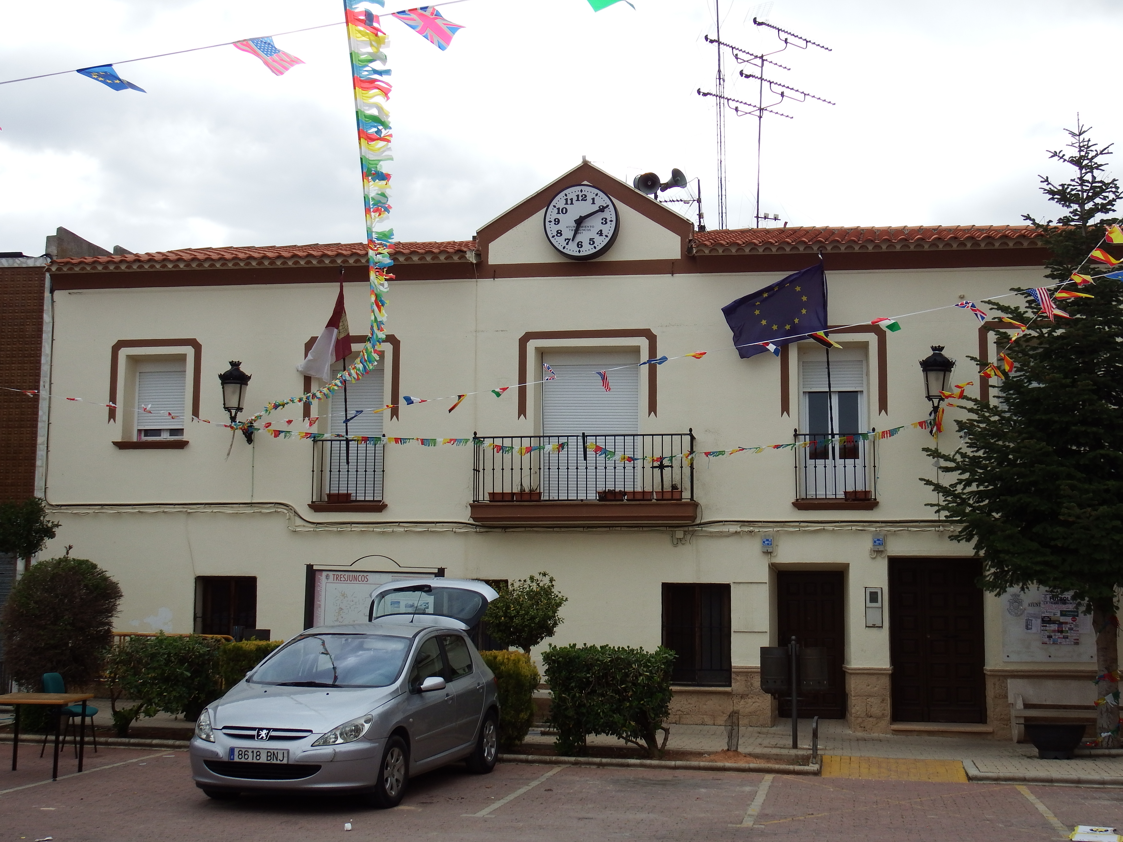 Fotos de Tresjuncos obtenidas en Wiki Takes Cuenca 2018